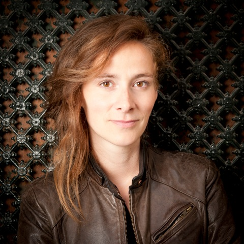 Emilie de Turckheim